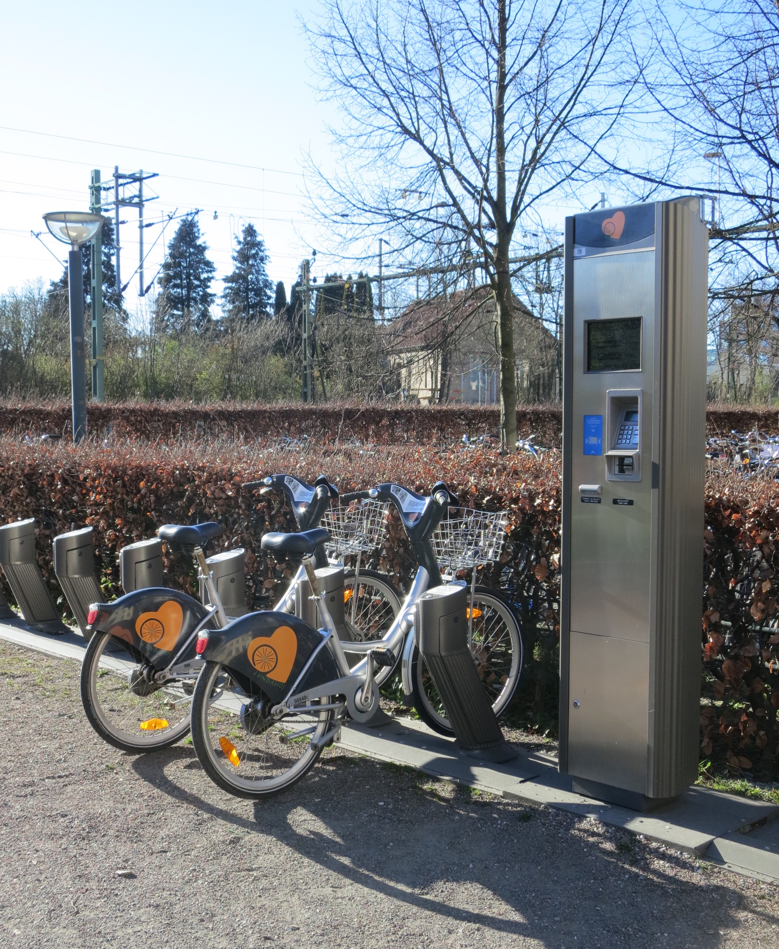 Lundahoj, cykelpool